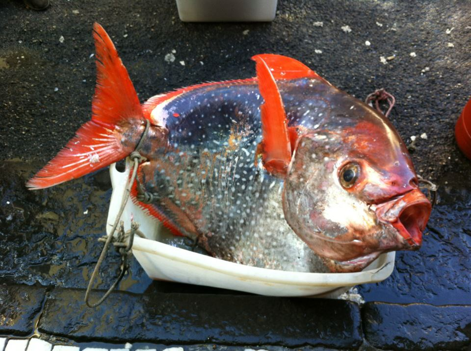 Pesce Re pescato a Castellammare di Stabia